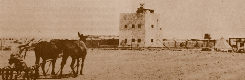 בית הביטחון במצפה גבולות 1946 ארכיון ההגנה